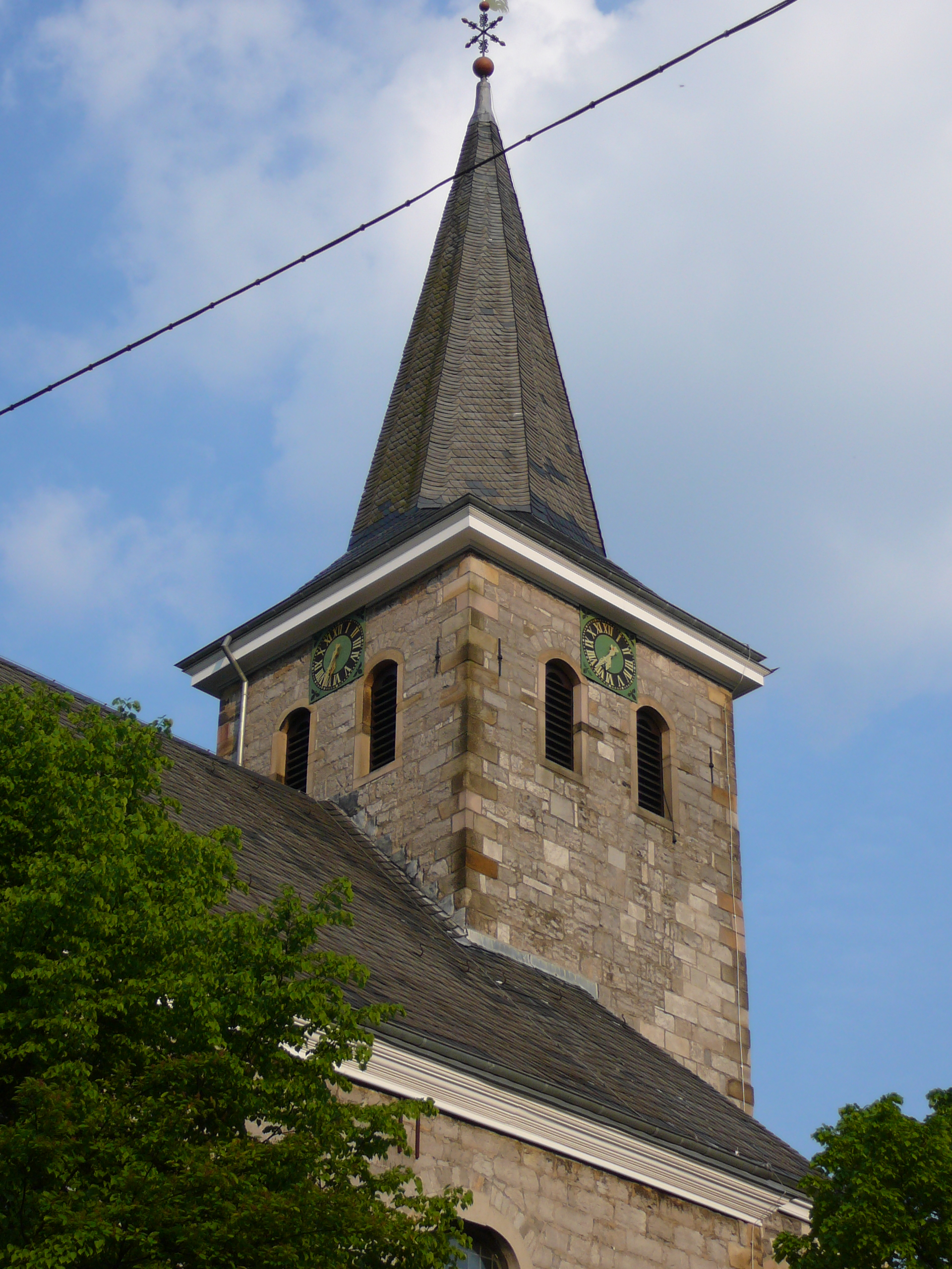 Schwelmer Straße, Wuppertal